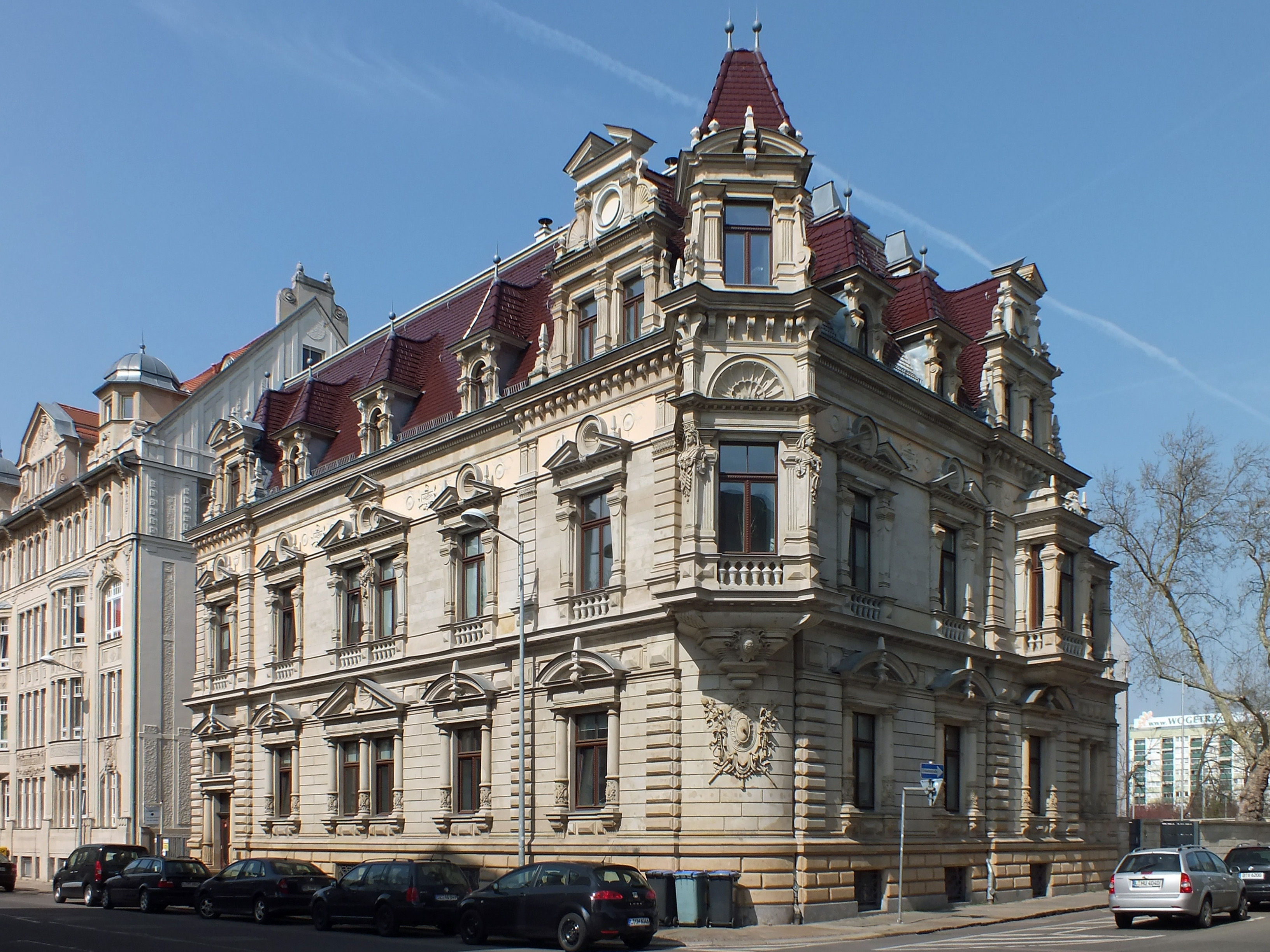 Die restaurierte Villa Schröder in Leipzig, Goldschmidtstraße 31